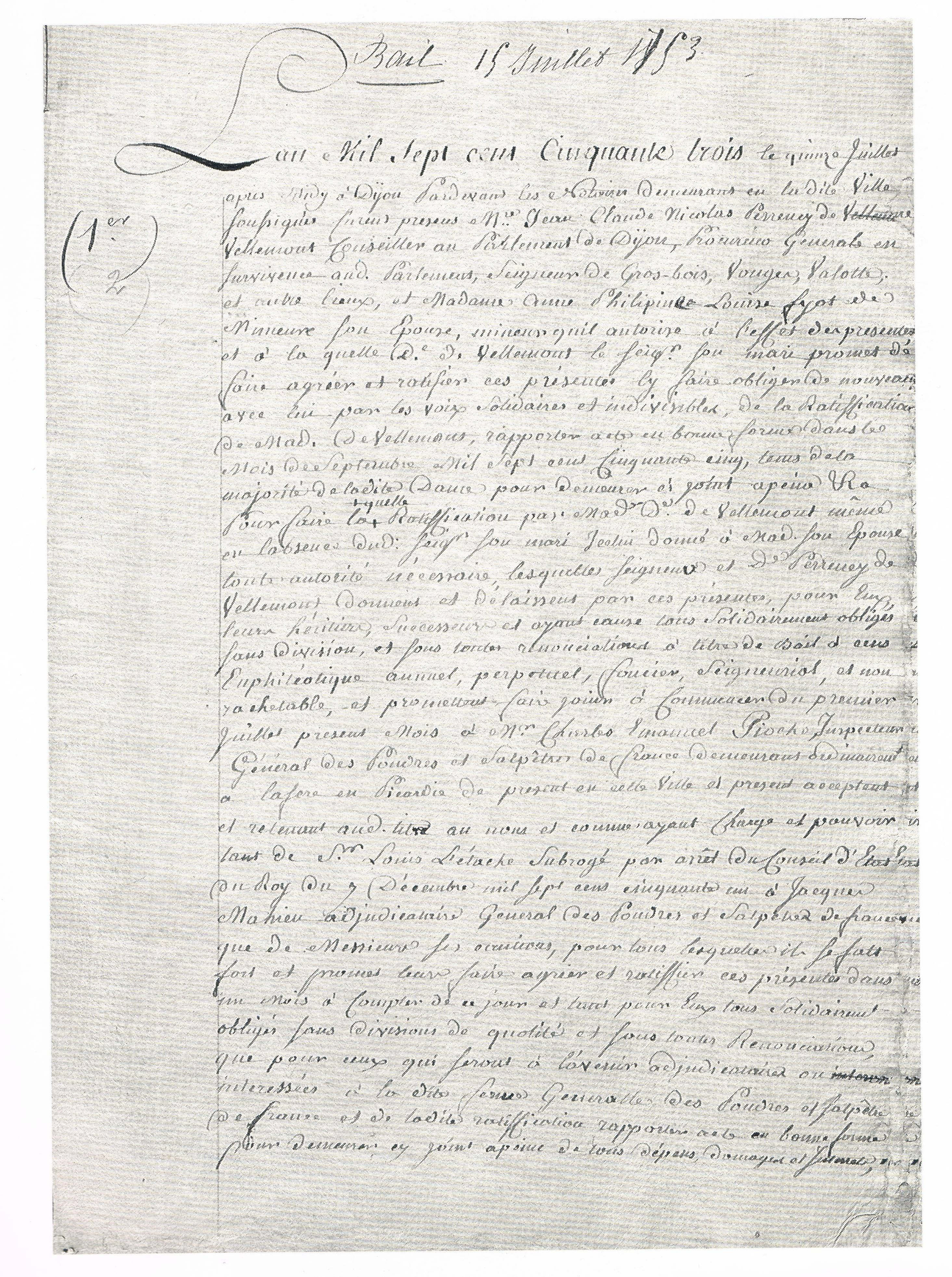 Acte d'achat du pré de Foullot à Vonges le 15 juillet 1753, constituant la fondation de la poudrerie royale de Vonges.